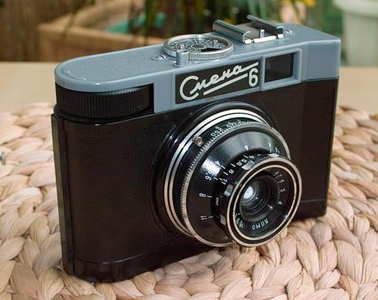 Appareil photo Smena 6, produit par la société Lomo de 1961 à 1969.